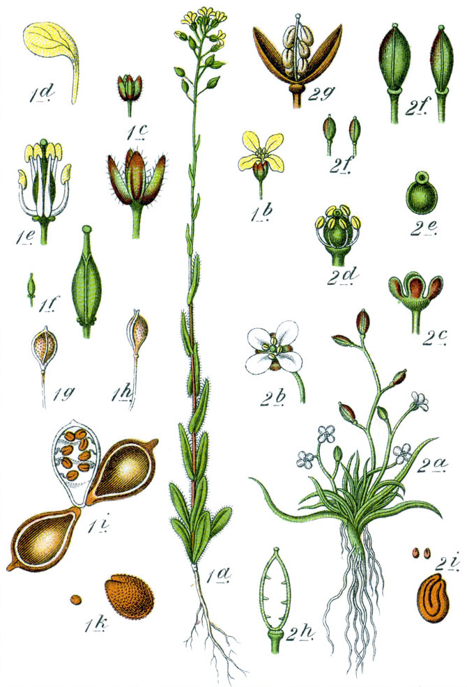 Camelina sativa (L.) Crantz, syn. Crucifera camelina E.H.L.Krause Subularia aquatica L., syn. Crucifera subularia (Lam.) E.H.L.Krause Original Caption 1. Wilder Dotter, Crucifera camelina microcarpa 2. Pfriemenkresse, C. subularia